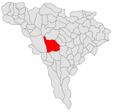 Categorie:Hărţi ale judeţului Alba